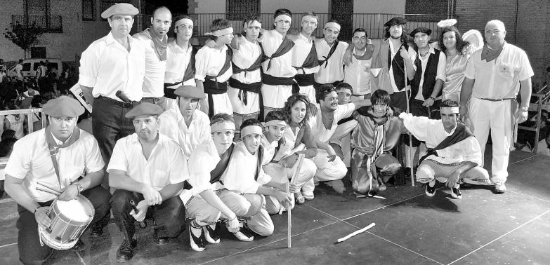 Paloteado de Ribaforada 2008